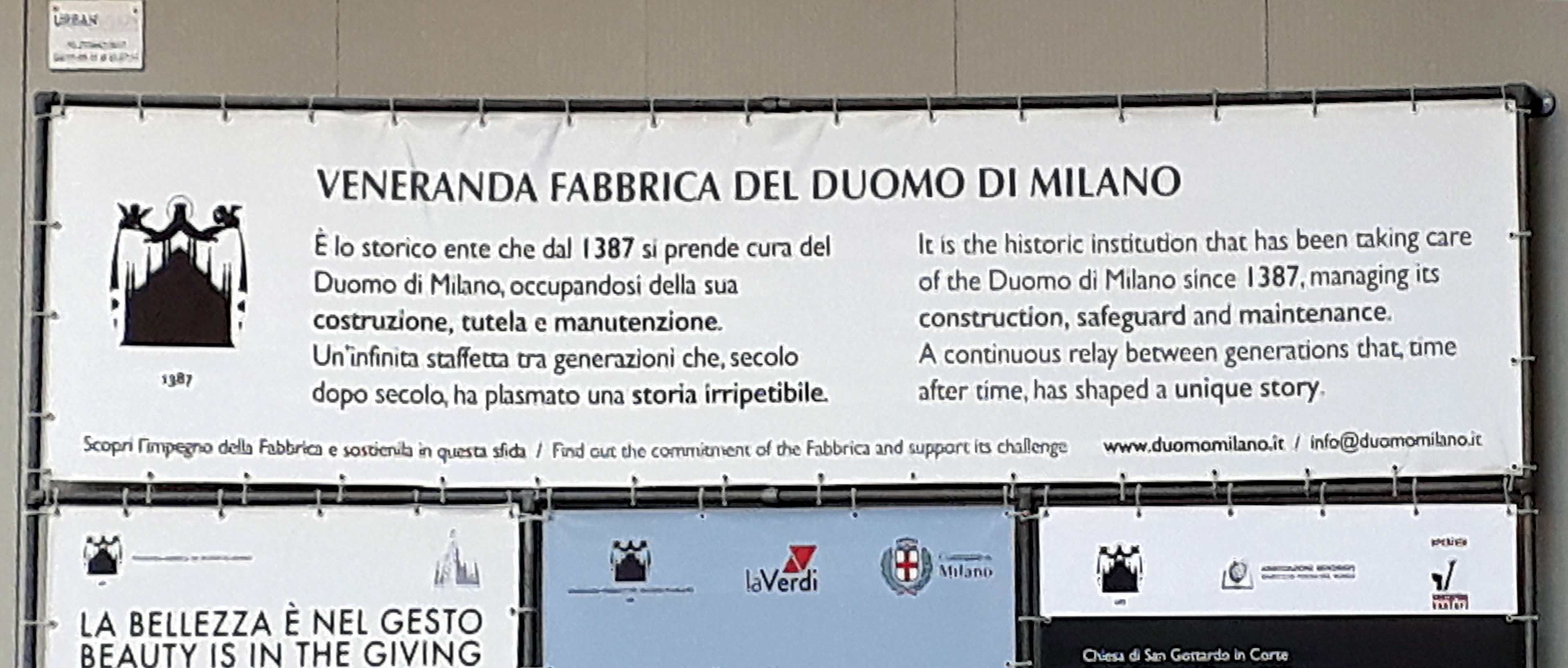 Mailand, Dom: Schild der Kirchenfabrik